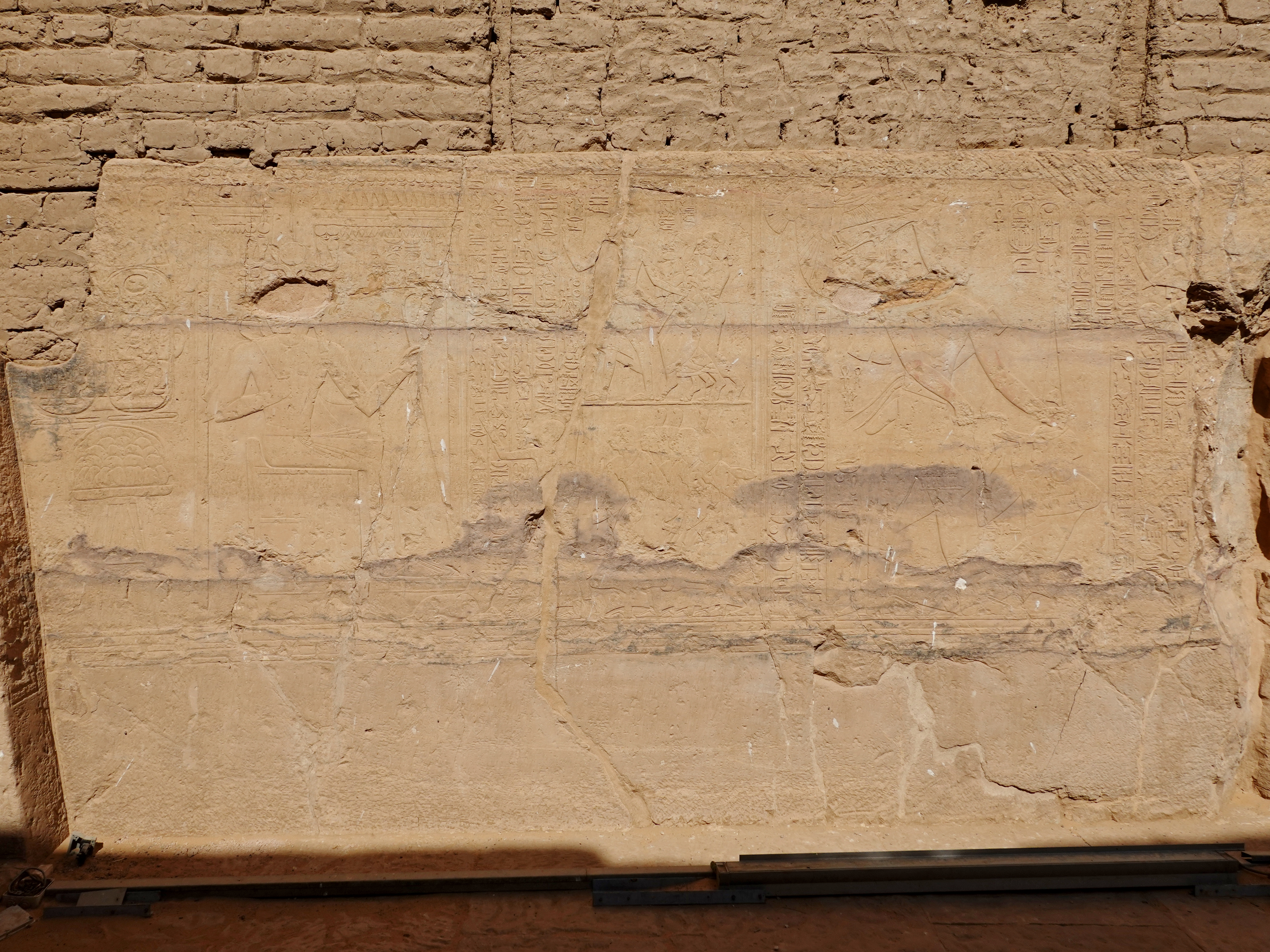 Relief an der Nordwestseite der Vorhalle (Vorhof) des den Göttern Amun-Re, Re-Harachte, Chnum und Anukis geweihten Tempels Ramses’ II., ursprünglich aus Beit el-Wali, im Freilichtmuseum auf der Insel Neu-Kalabscha im Nassersee, Ägypten